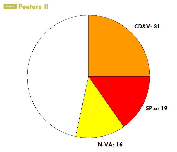 Voorstelling samenstelling meerderheid Vlaamse regering Peeters II (2009-)